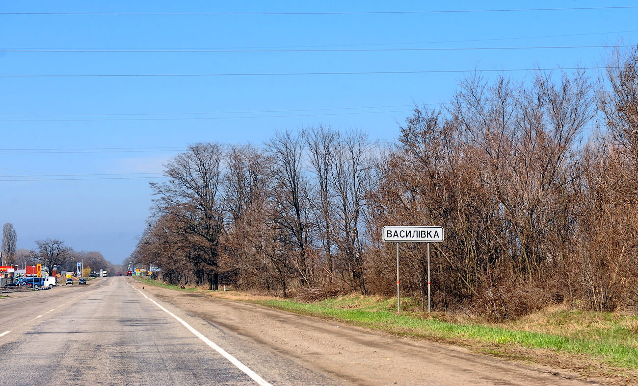 Васильевка въезд